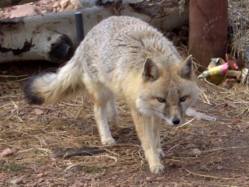 Renard véloce (Vulpes velox) au Colorado Wolf and Wildlife. Détail depuis File:Swift_Fox_Colorado_Wolf_and_Wildlife_01.jpg